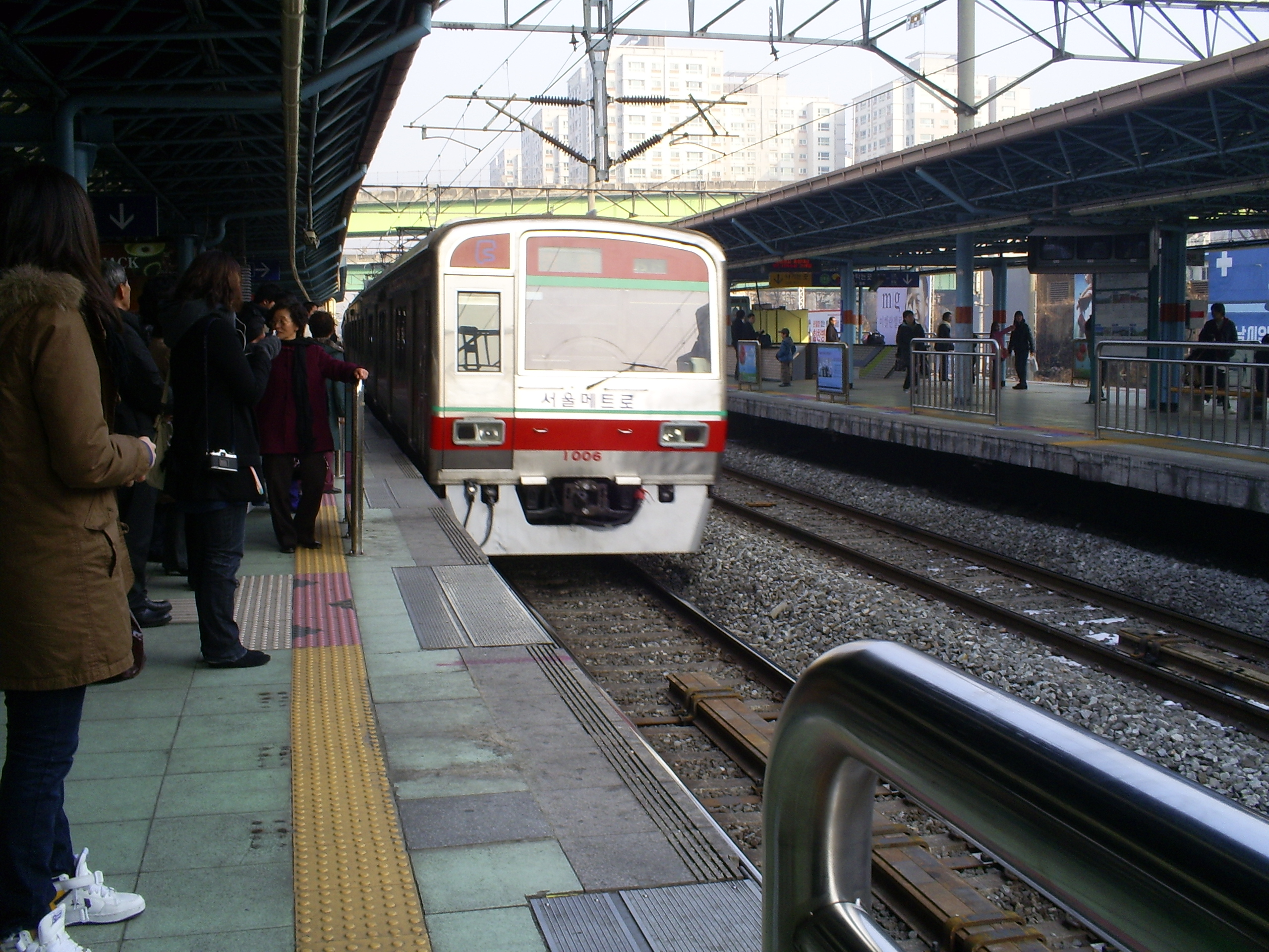 신도림역에 진입하는 병점행 서울메트로 1000호대 VVVF 전동차 직접 촬영 2009년 1월 17일 촬영 촬영 장소 : 1호선 신도림역 천안, 인천방면 승강장